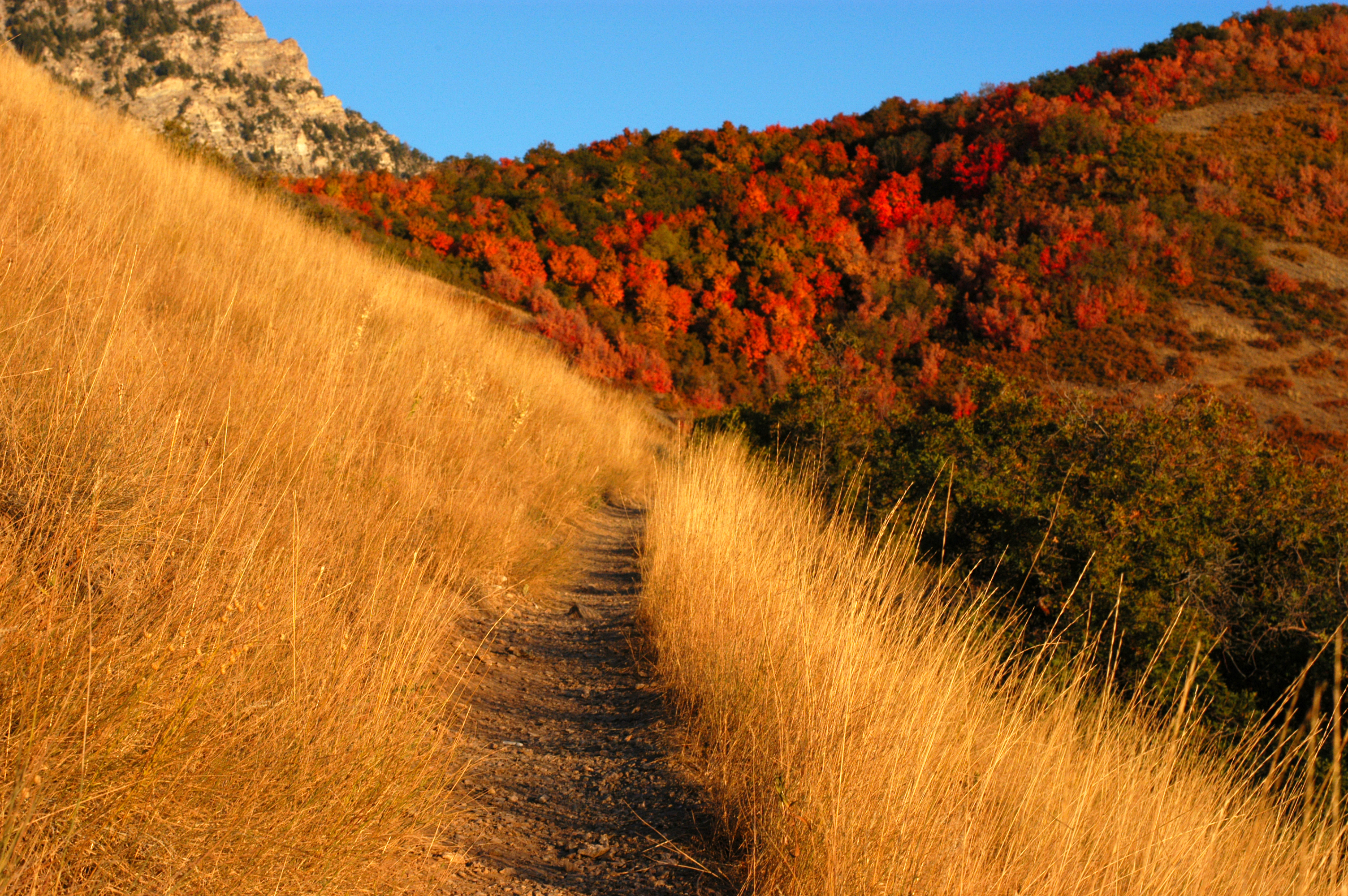 A mountain trail in autumn, Provo, Utah, US.